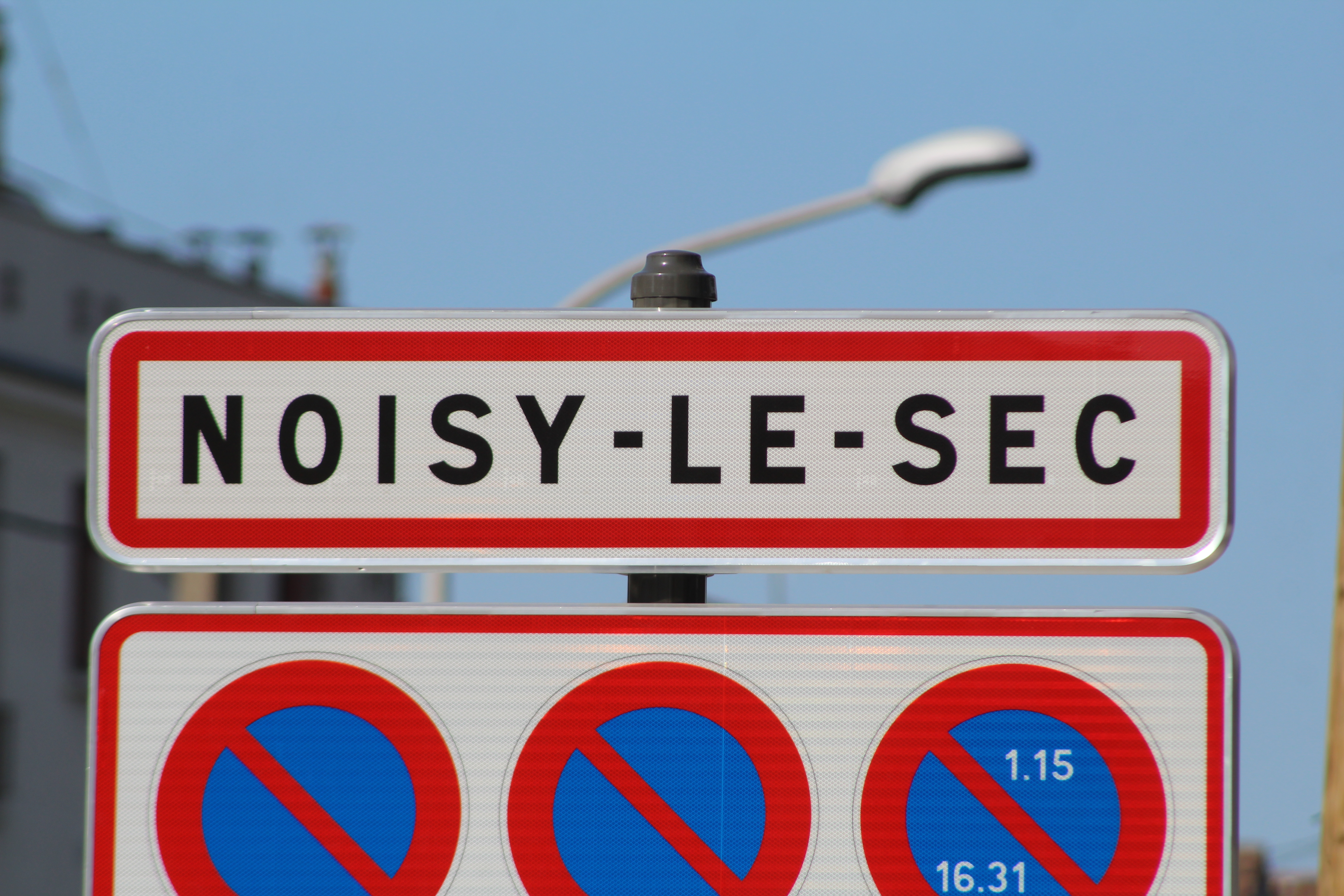 Panneau d'entrée dans Noisy-le-Sec.